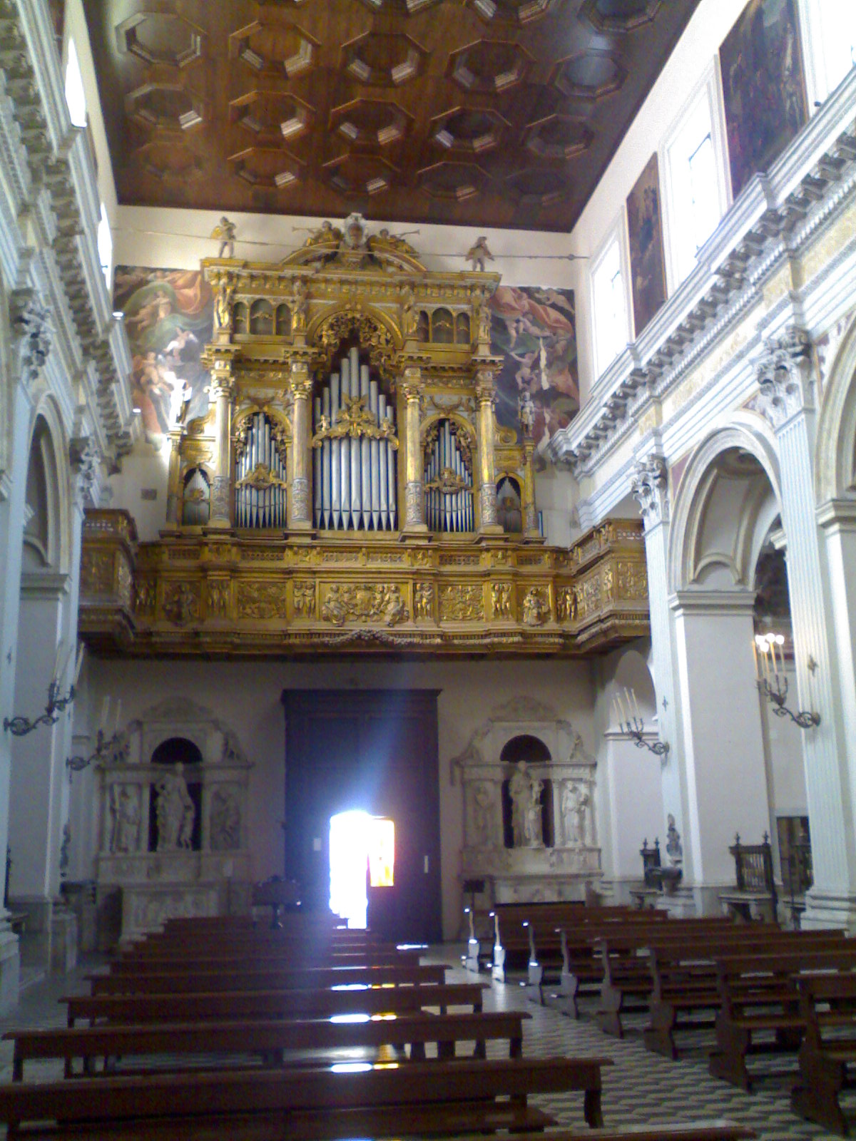 chiesa di sant'anna dei lombardi (napoli)